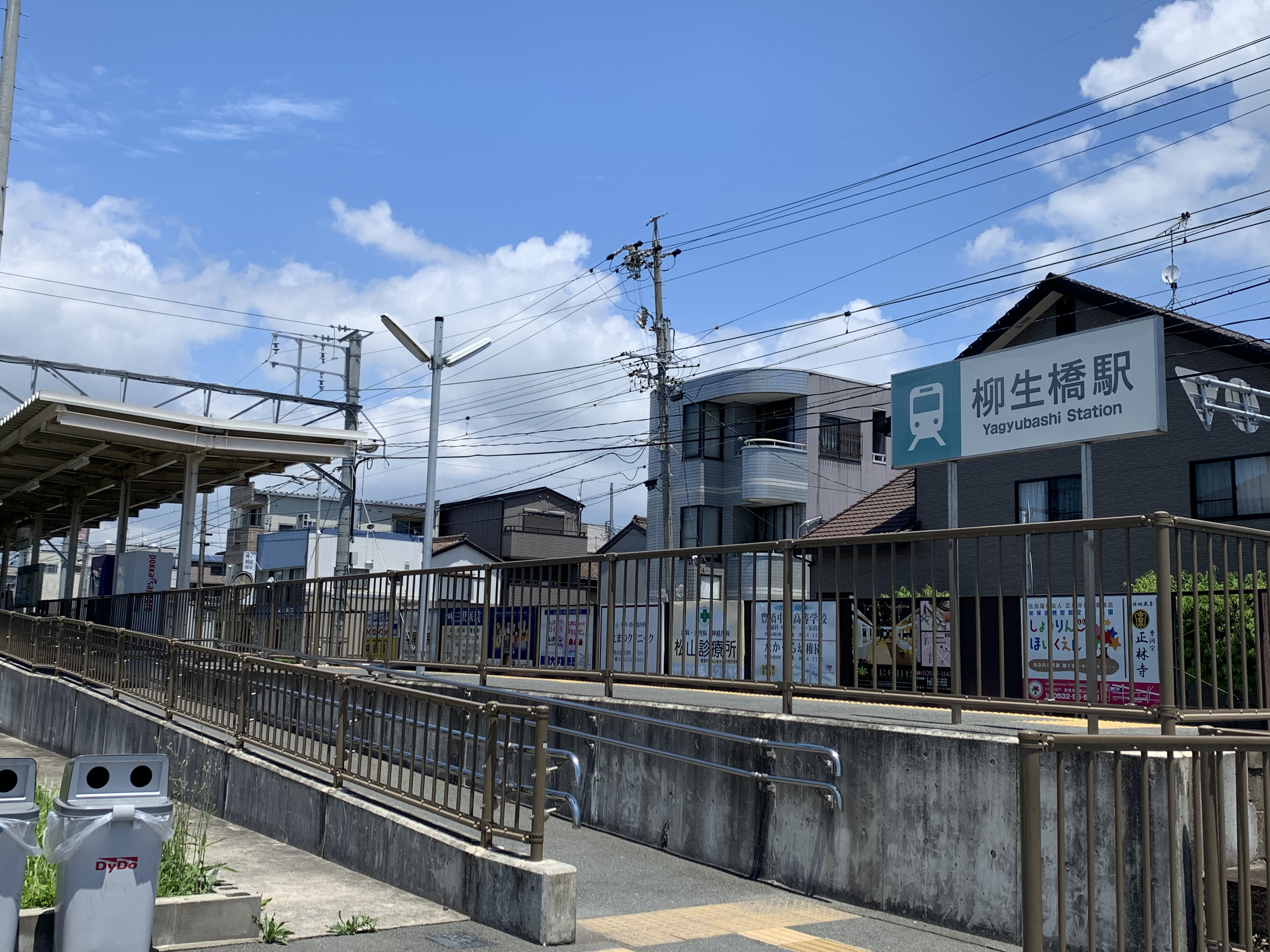 現在の柳生橋駅